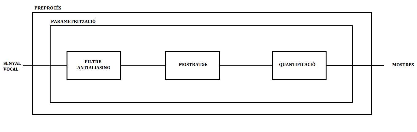 Parametrització d'un decodifcador acústic fonètic